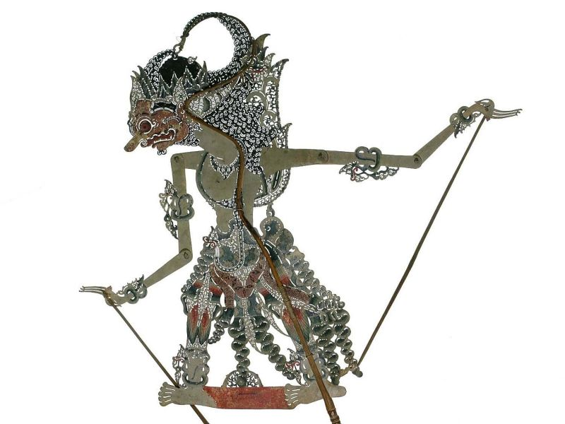 Schaduwfiguur. Indrajit is de zoon van de reuzenvorst Rahwana.. Wajangfiguur van perkament voorstellende Indrajit Unknown language: Megenanda Wayang kulit purwa